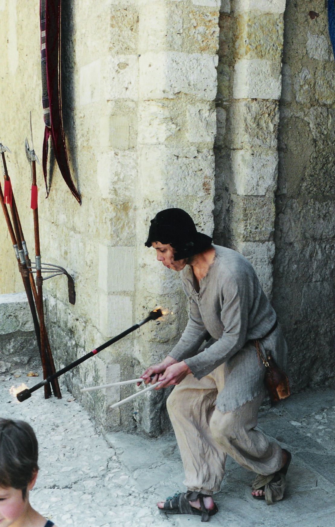 Jongleur déguisé en manant à la porte de Sarrant (France, Gers).